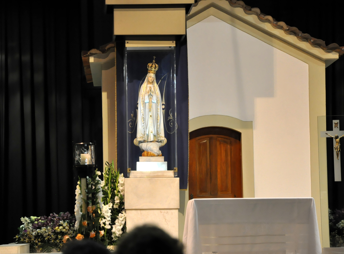 Fatima 0751